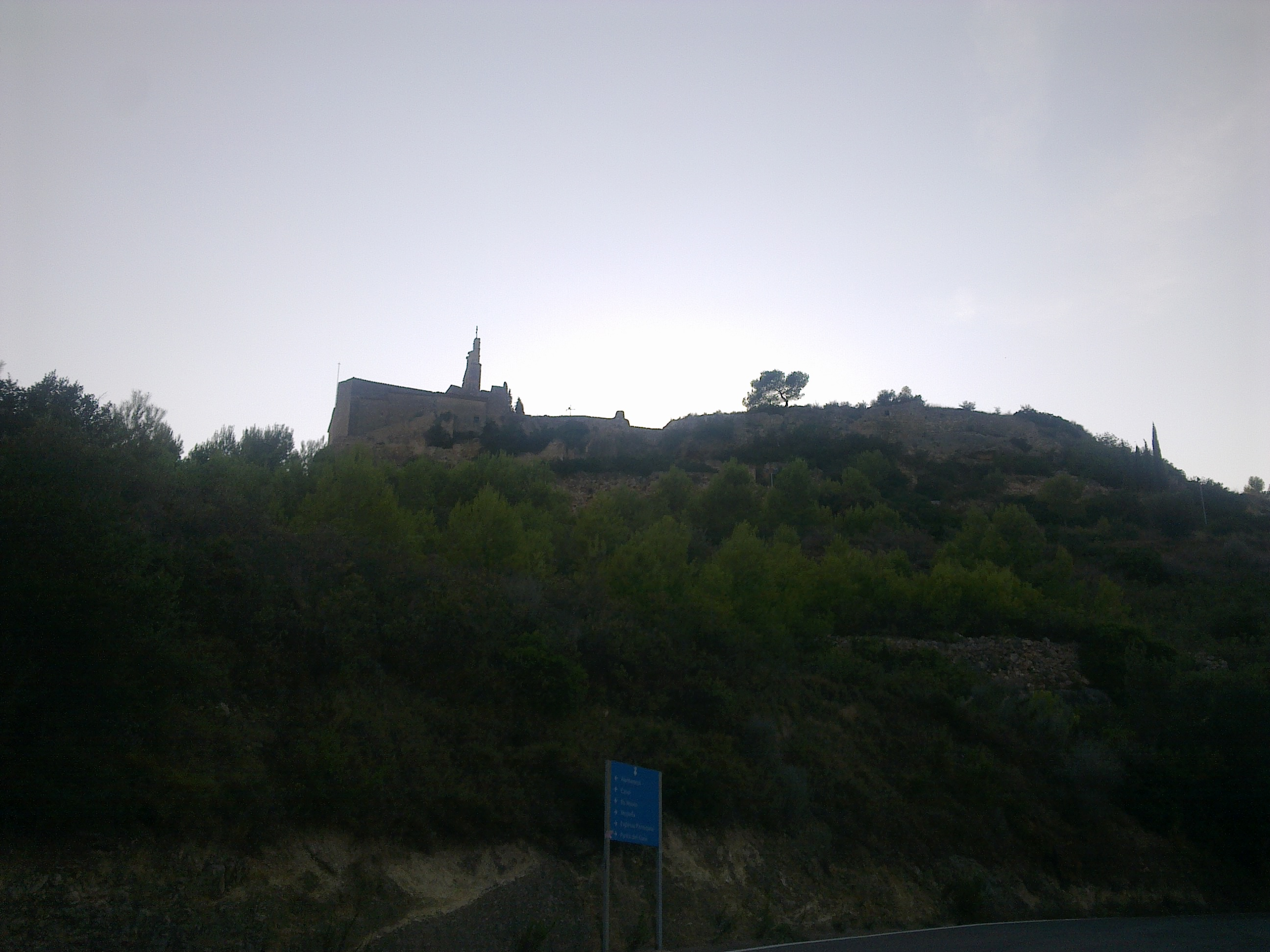 Castell de Vespella (Vespella de Gaià)